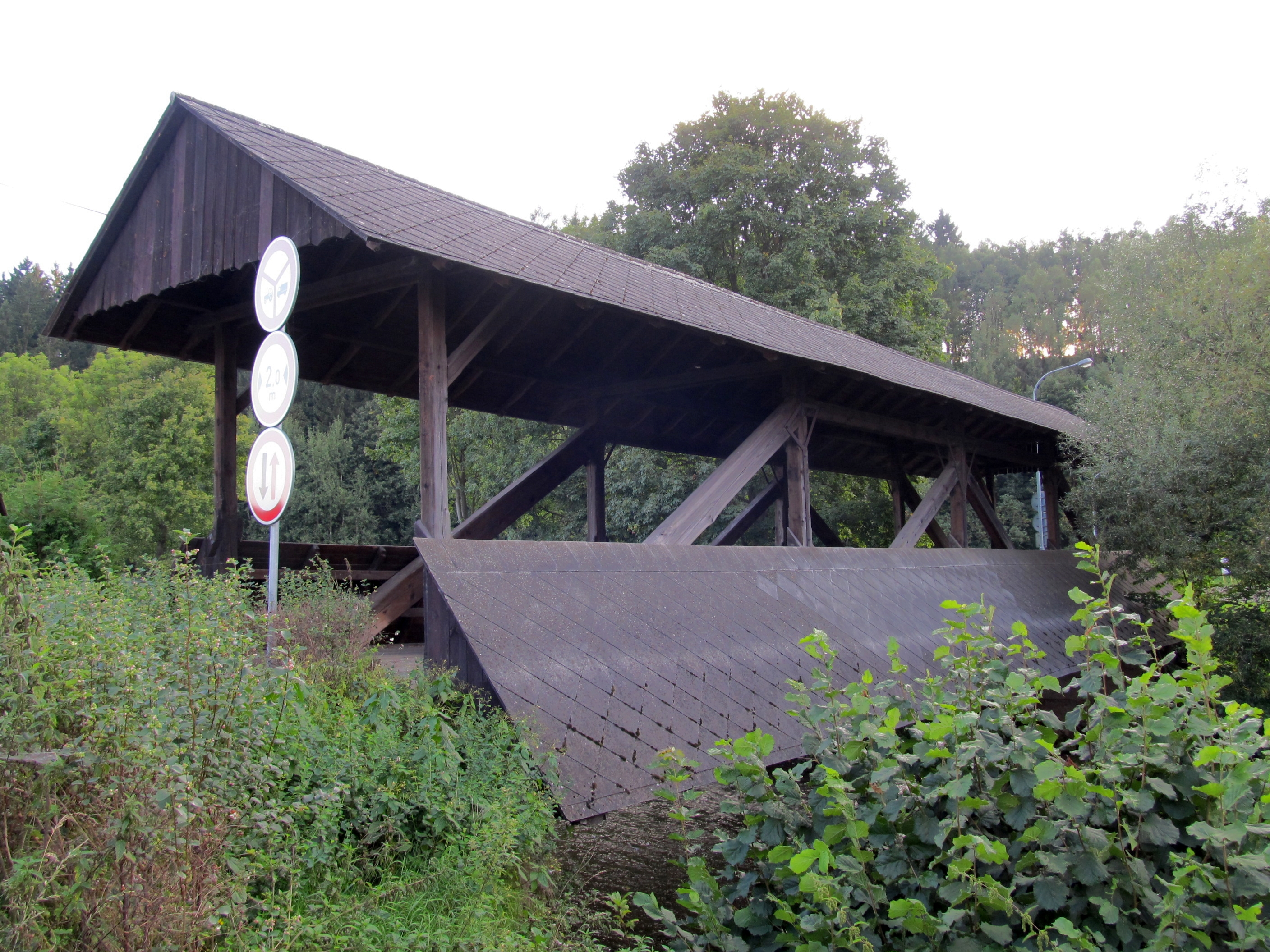 Silniční most dřevěný (Havlovice), horní tok řeky Úpy, Havlovice